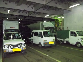 貨物船内部、航送甲板